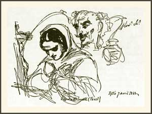 Рисунок Е.П.Блаватской, сделанный ею после посещения оперного спектакля "Фауст" (Гуно), поставленного в Тифлисе уже через три года после того, как в Париже состоялась его примьера. На рисунке изображены персонажы оперы: Маргарита и Мефистофель.